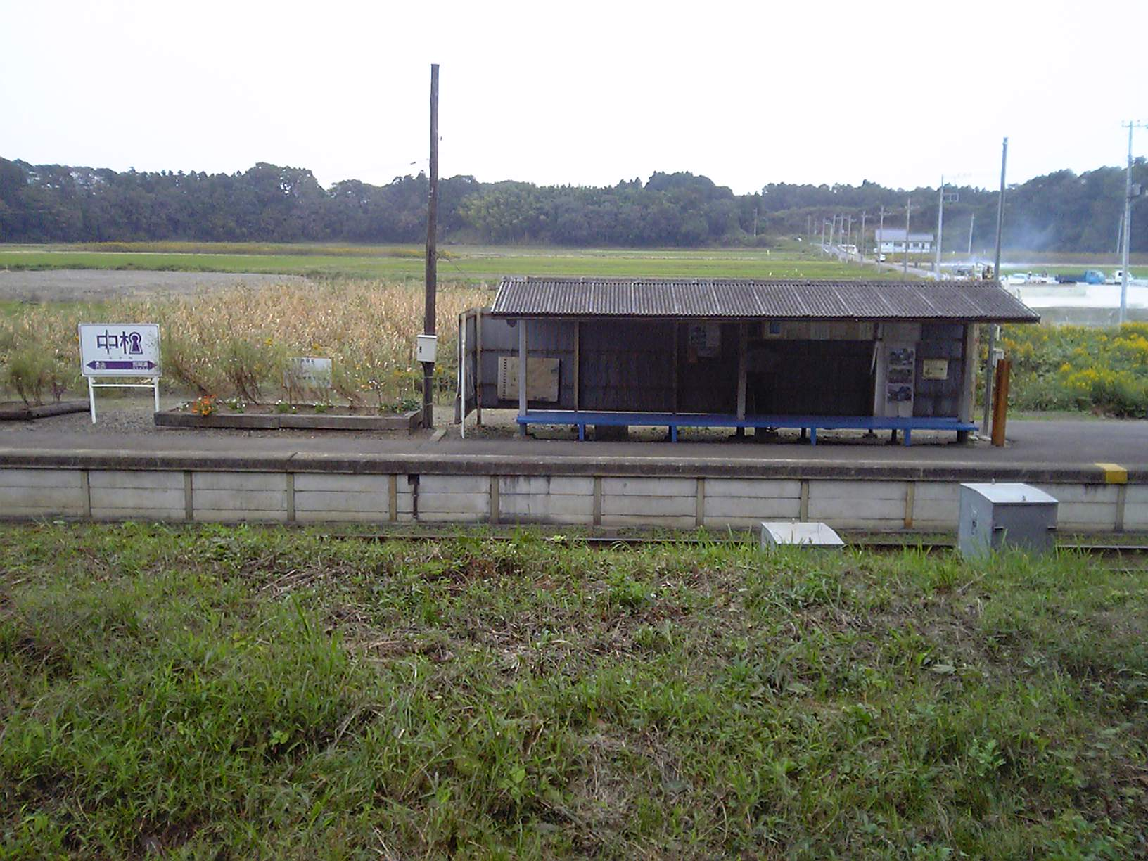 中根駅(2009/10/24撮影)